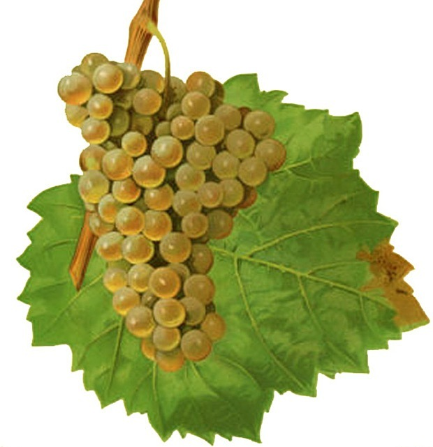 Grappe de Gouget blanc par Viala et Vermorel